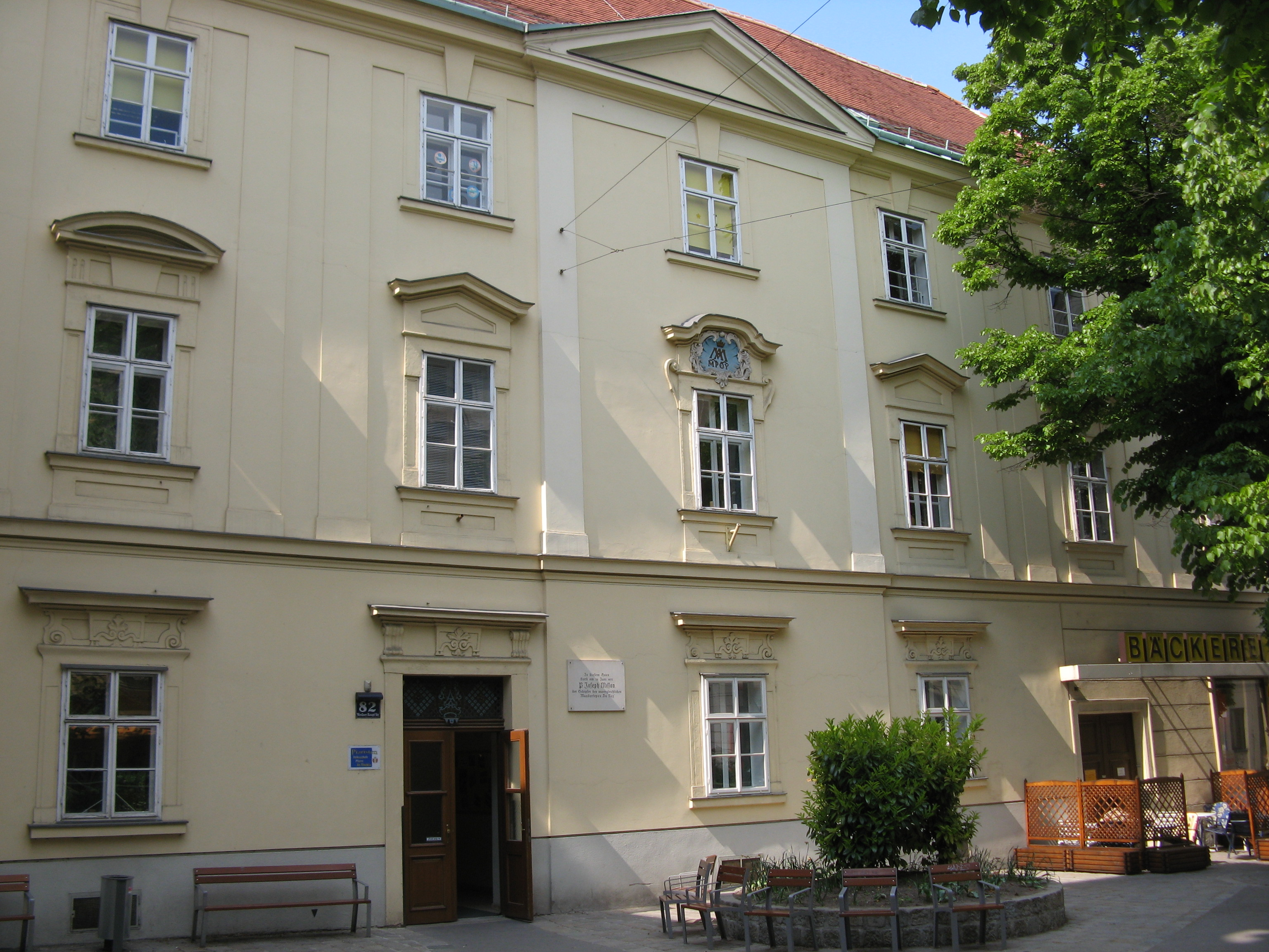 Kollegium und Schule der Piaristen (1753-57) von Josef Matthias Gerl, Wiedner Hauptstraße 82, Wien-Wieden